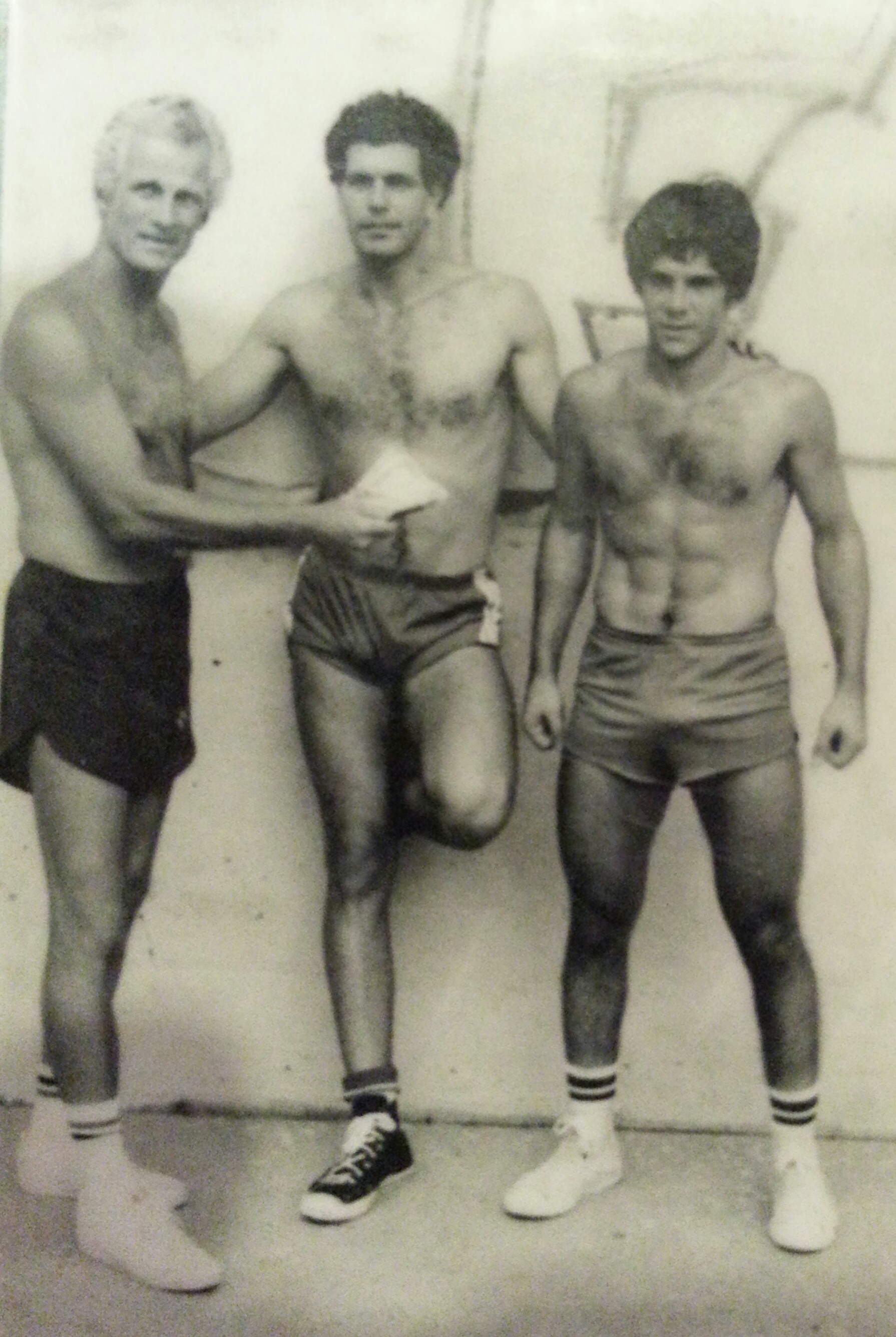 Ruby Obert, Joe Durso and Albert Apuzzi